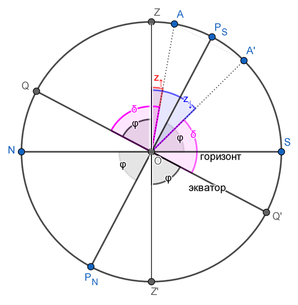 Верхняя (A) и нижняя (A') кульминации светила, видимые наблюдателю из южного полушария.